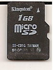 Kingston Micro SD de 1GB (SD-C01G) de capacidad.